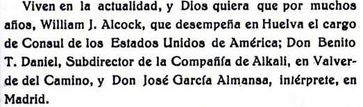 Referencia a William Alcock en 1920